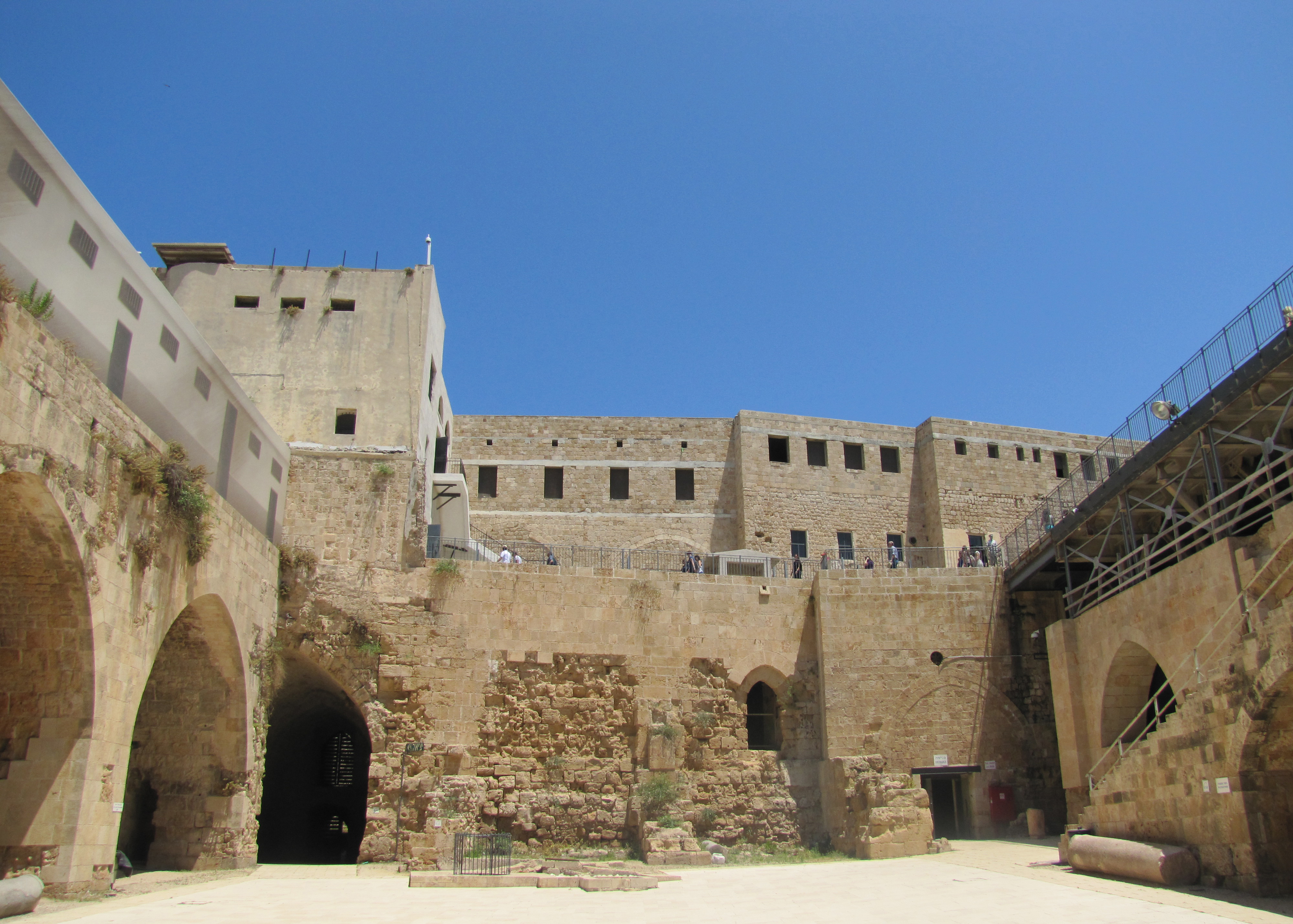 המצודה בעכו נבנתה בימי הטורקים על בסיסה של המצודה ההוספיטלרית בצפונה של העיר העתיקה. המצודה הייתה חלק מן המבנה ההגנתי של עכו, וצידה הצפוני שולב בחומה הצפונית ובמגדל השמירה בורג' אל חזינה. המצודה בנויה סביב שתי חצרות מלבניות, אורכה ממזרח למערב הוא כ-170 מטר ורוחבה כמאה מטרים. במהלך המאה ה-20 שימשה המצודה כבית כלא, ובזמן המנדט הבריטי שימשה גם להוצאה להורג של עולי הגרדום. ב-4 במאי 1947 נערך אחד ממבצעי האצ"ל הנועזים, פריצת כלא עכו, שבמסגרתו פרצו חברי האצ"ל אל המצודה, ושחררו רבים מן הכלואים בה. לאחר קום המדינה שימש המקום כבית חולים פסיכיאטרי.